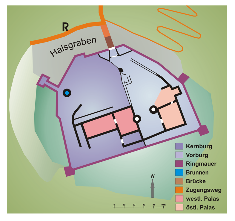 Karte der Ruine Collenburg am Main - Germany